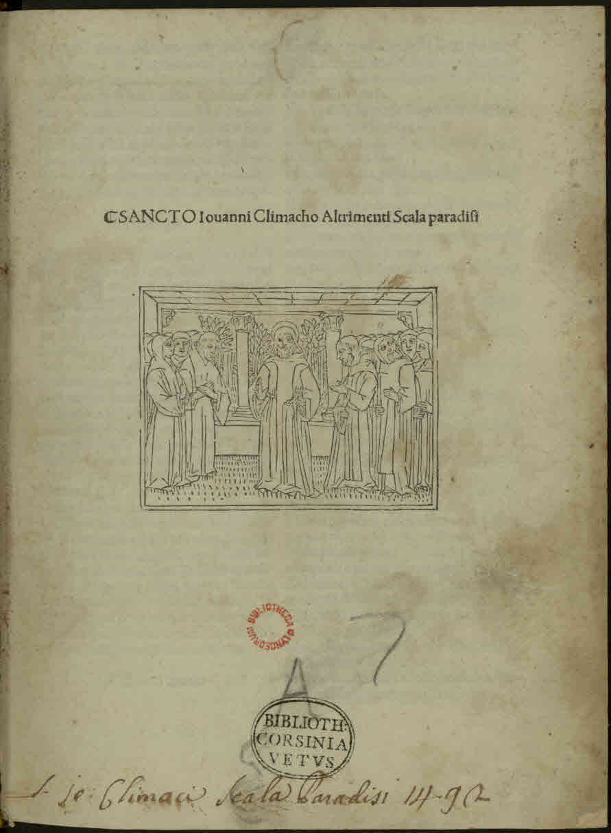 Scala paradisi (italiano). - Questo libro fu facto in Venetia : per Christophoro da Mandelo, nel MCCCCLXXXXII die XII mensis octubris. - 98 c. ; a-l⁸, m¹⁰ ; 4° .